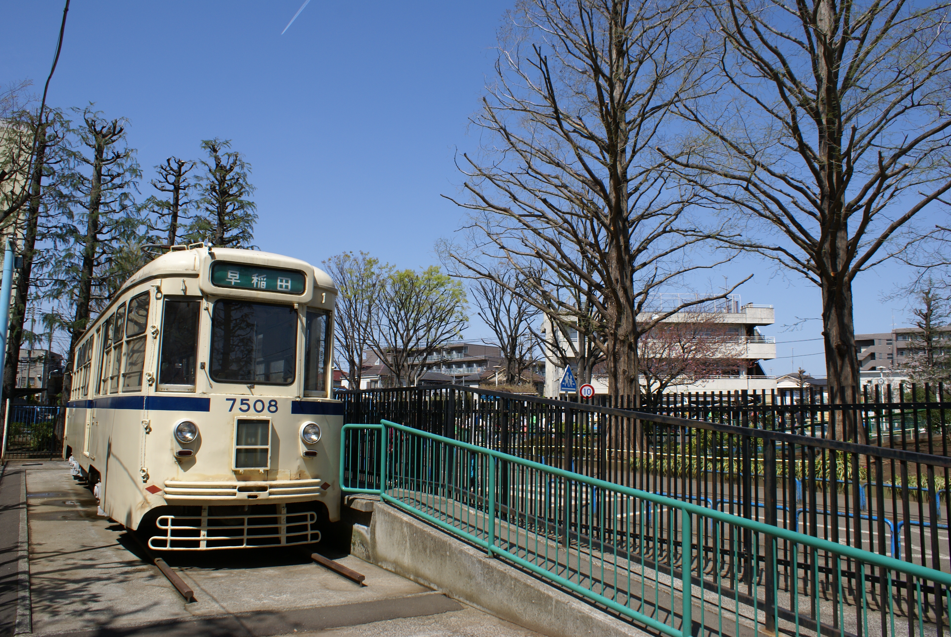 板橋交通公園